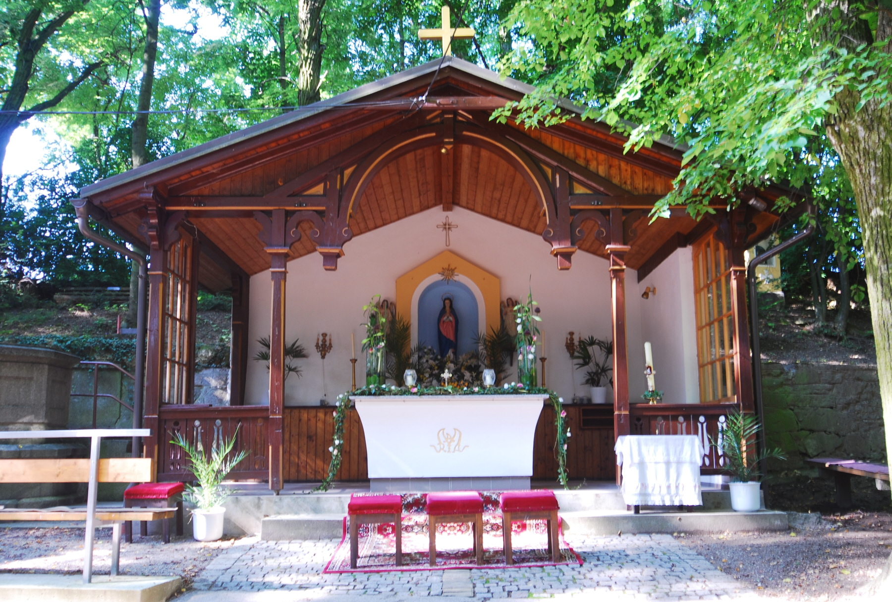 Marienkapelle beim Pulkauer Bründl bei Pulkau (Niederösterreich)